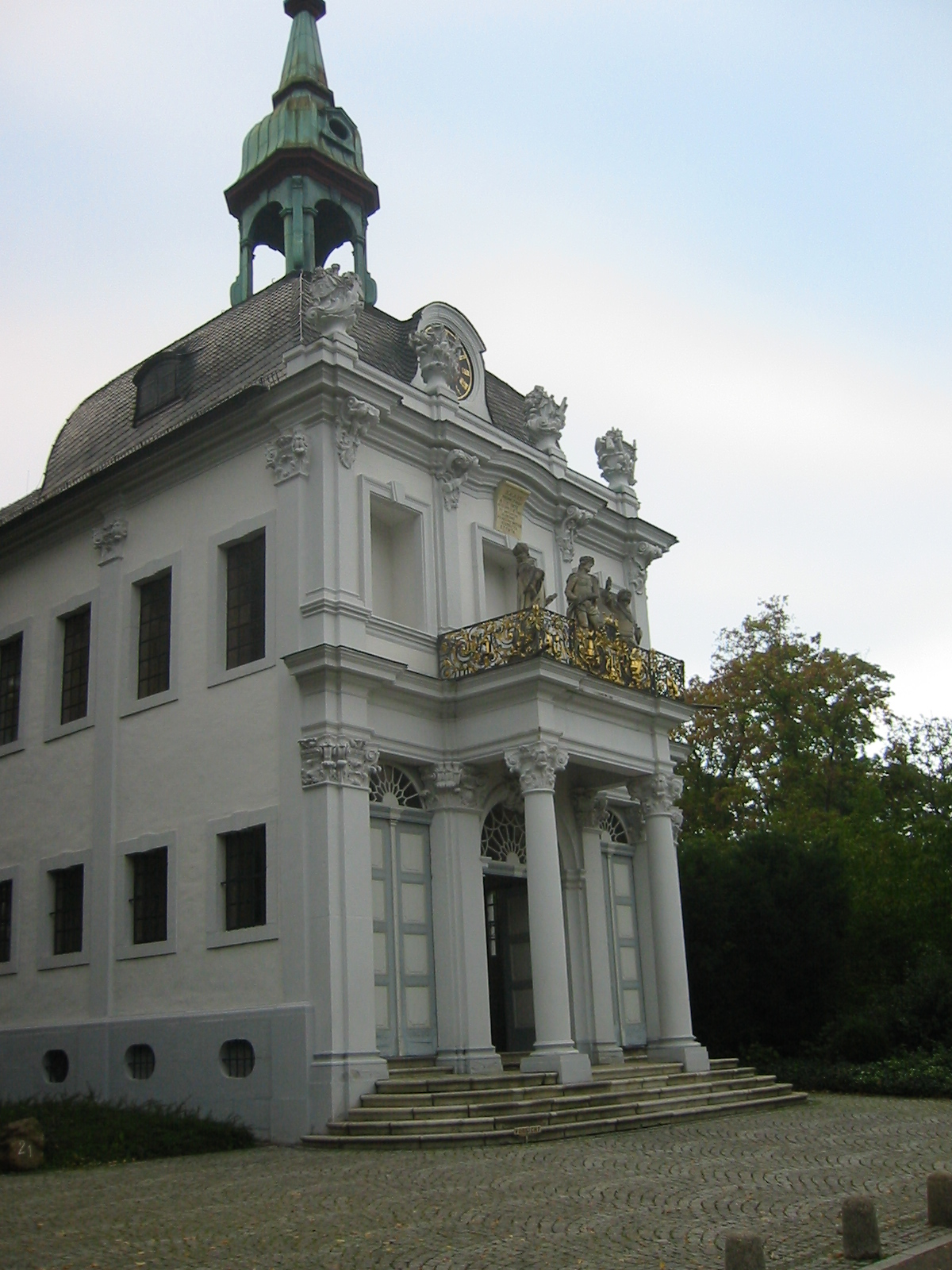 Kreuzberg Church, Bonn-Germany- Kreuzbergkirche